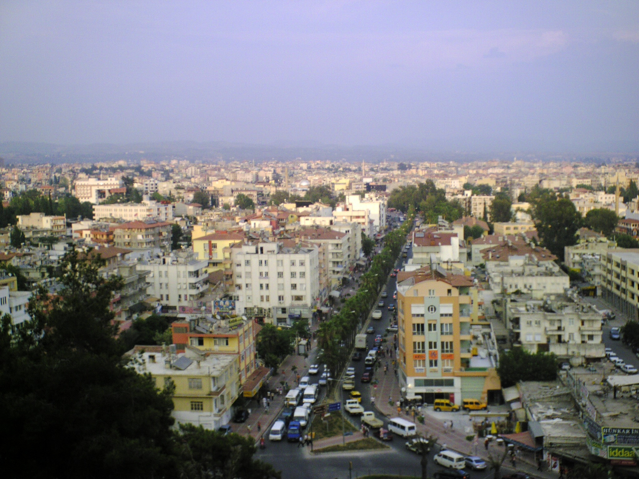 Das Bild stellt die tÃ¼rkische Stadt Manavgat "von oben" dar.